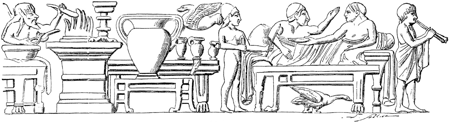 Libation pendant le repas (bas-relief étrusque de Chiusi)